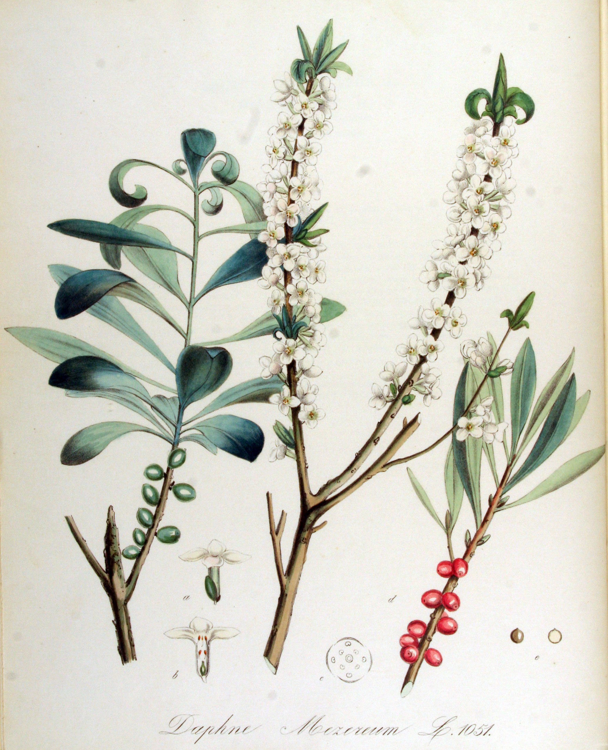 Daphne mezereum